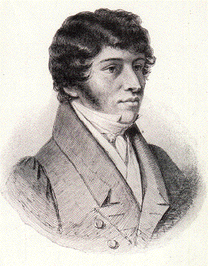 Portrait.